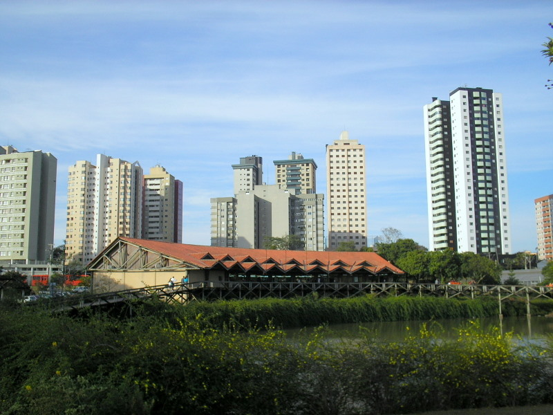 Museu Botânico Municipal no Jardim Botânico de Curitiba, PR, Sul do Brasil.